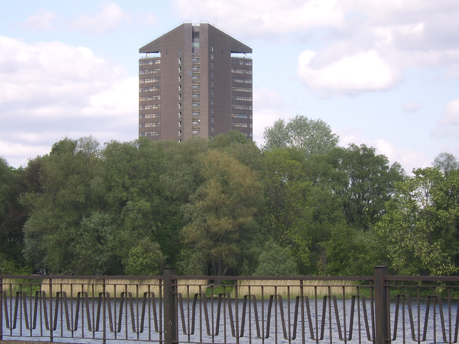 LTV (Latvijas Televīzija no austrumu puses)